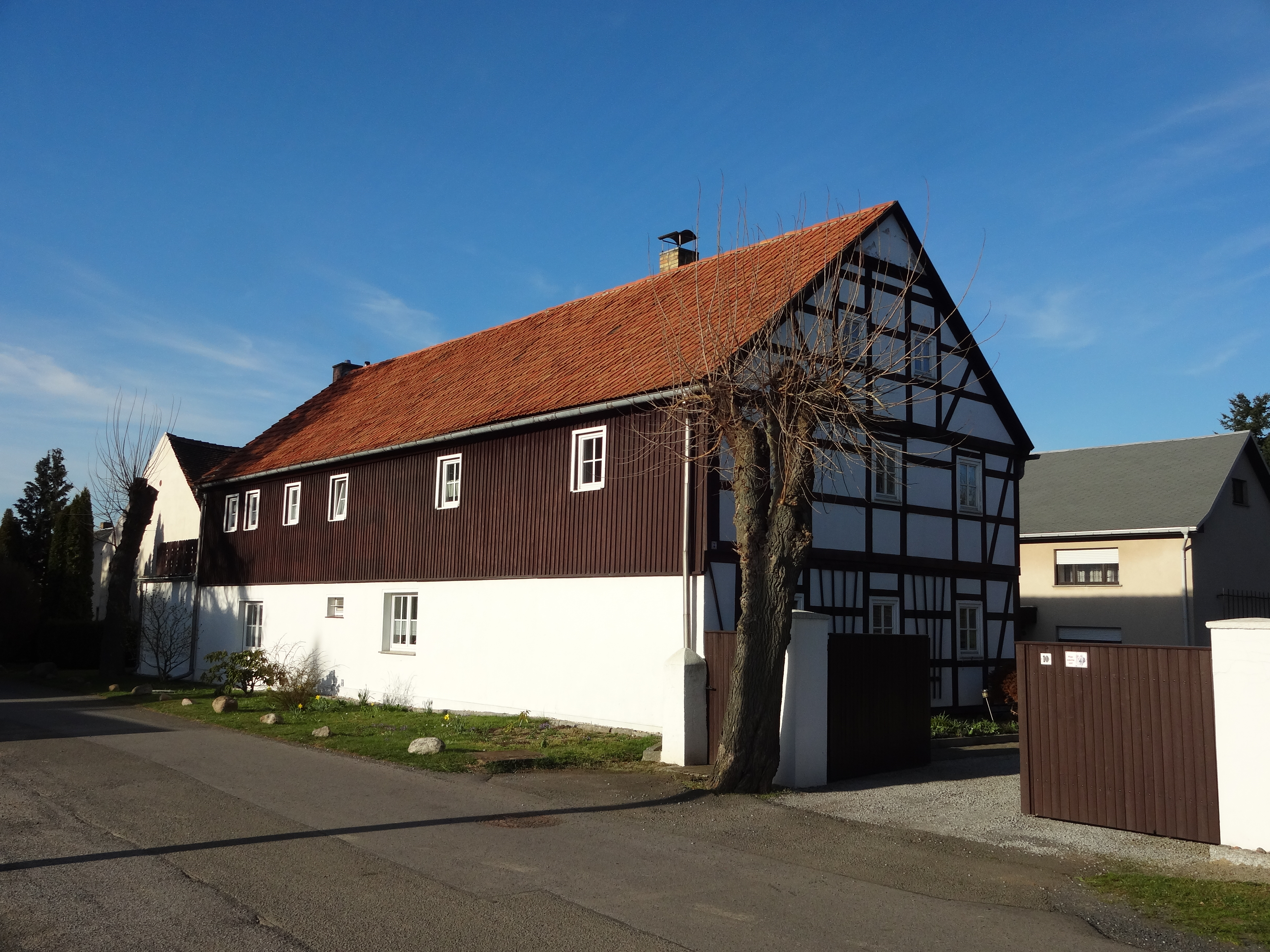 denkmalgeschütztes Westliches Wohnstallhaus eines Vierseithofes in der Nordstraße 10 in Biehla, Ortsteil von Schönteichen